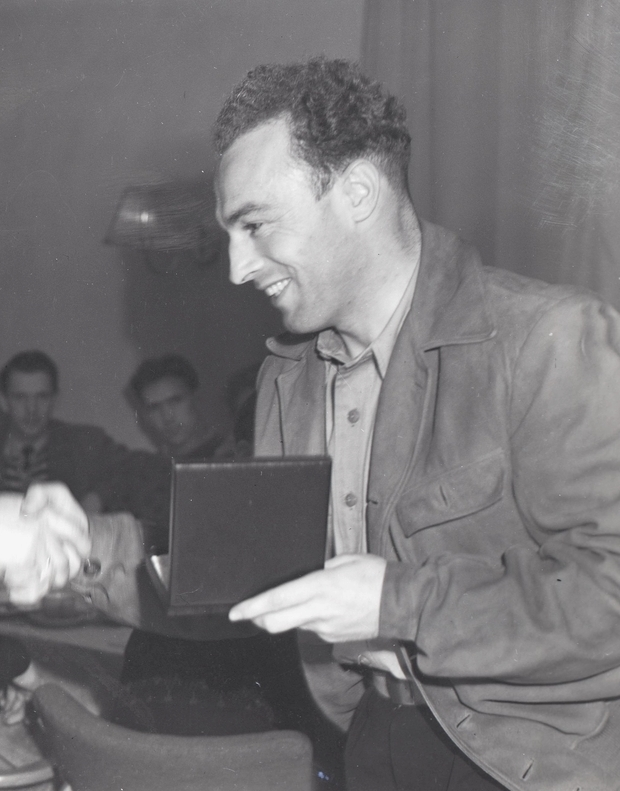 Skøyteløper Sverre Farstad mottar premie